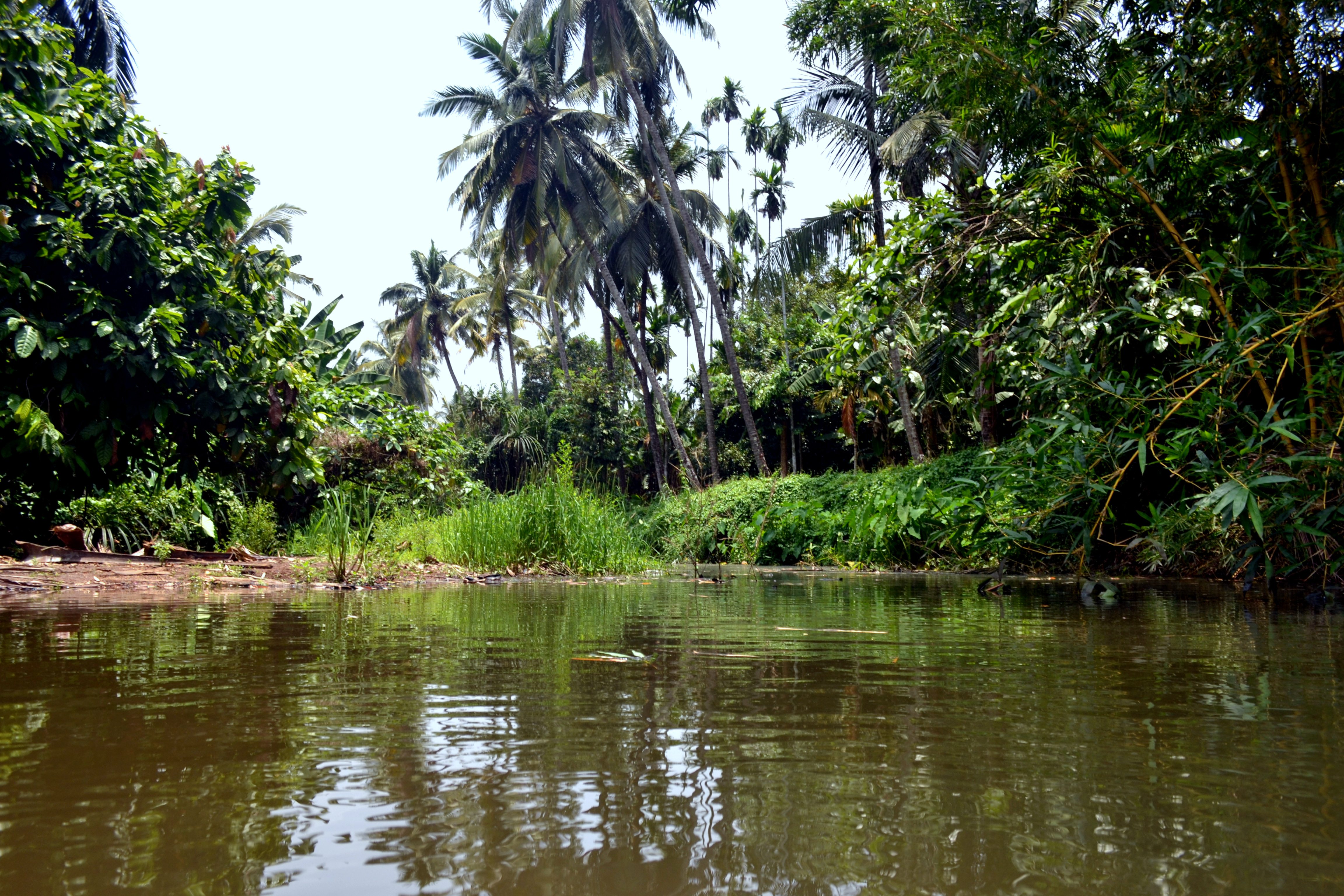 താണിക്കുടം പുഴ മദ്ധ്യവേനൽ സമയത്തു്